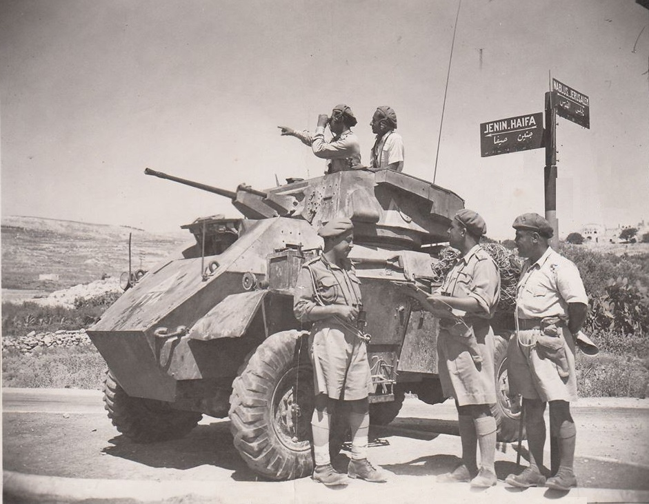 الزعيم طاهر عبدالغفور في مدينة جنين خلال حرب 1948